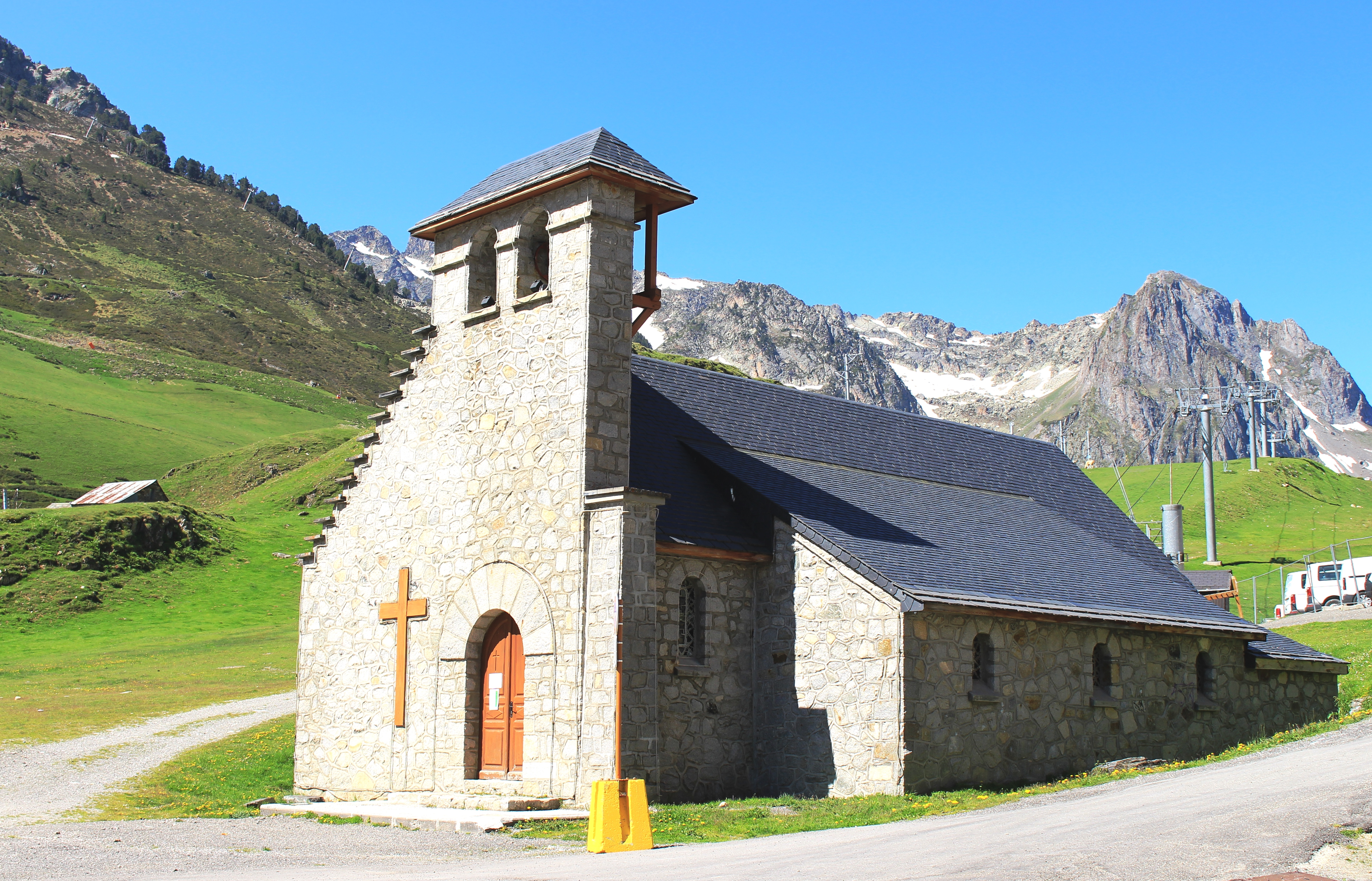 Chapelle Notre-Dame-des-Neiges de La Mongie (Hautes-Pyrénées)